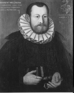 Gemälde in der Tübinger Professorengalerie